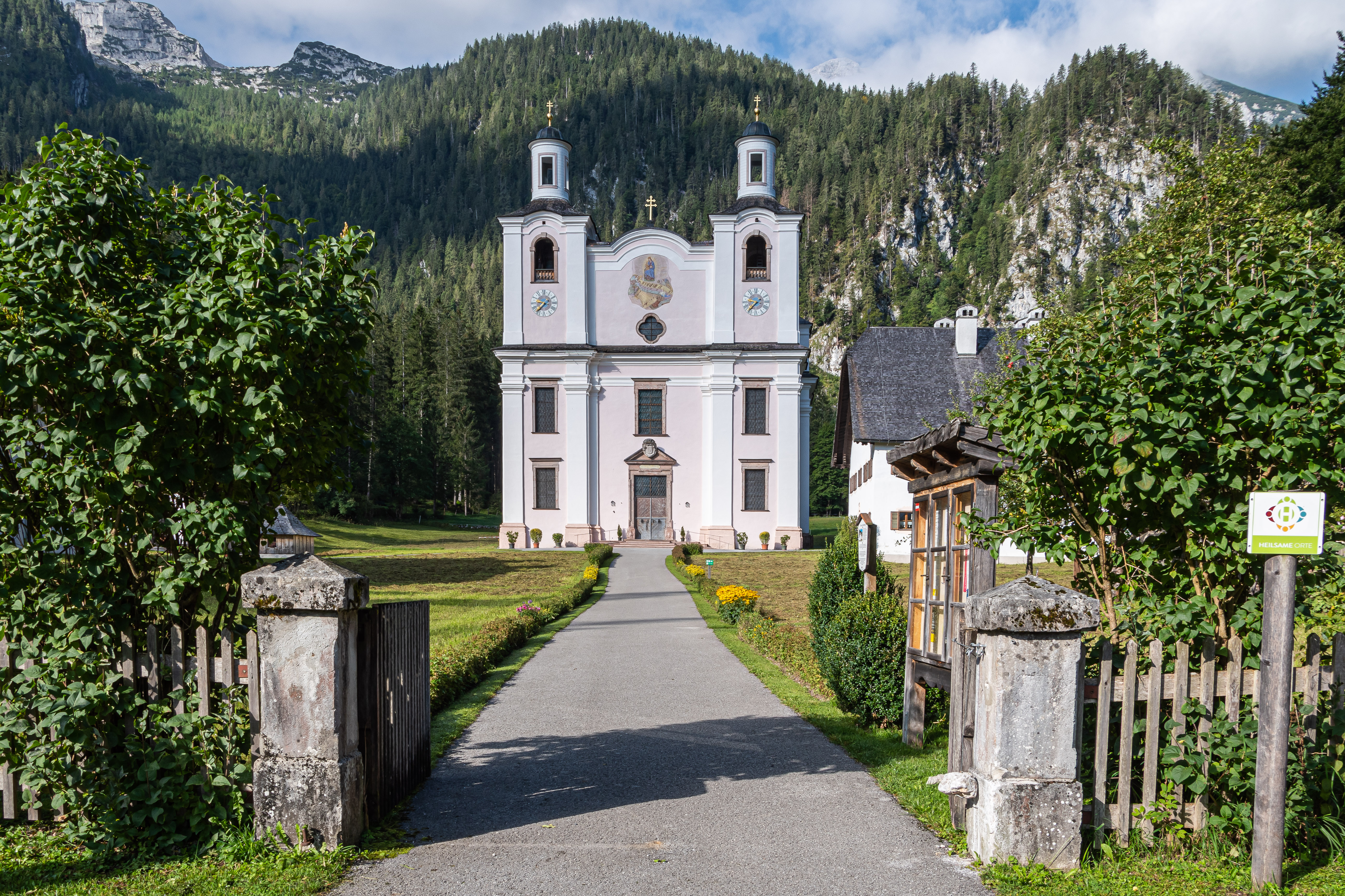 Die Wallfahrtskirche Maria Kirchenthal wurde im 17. Jahrhundert erbaut. Sie befindet sich auf einer Höhe von 872 m in einem Tal der Loferer Steinberge.